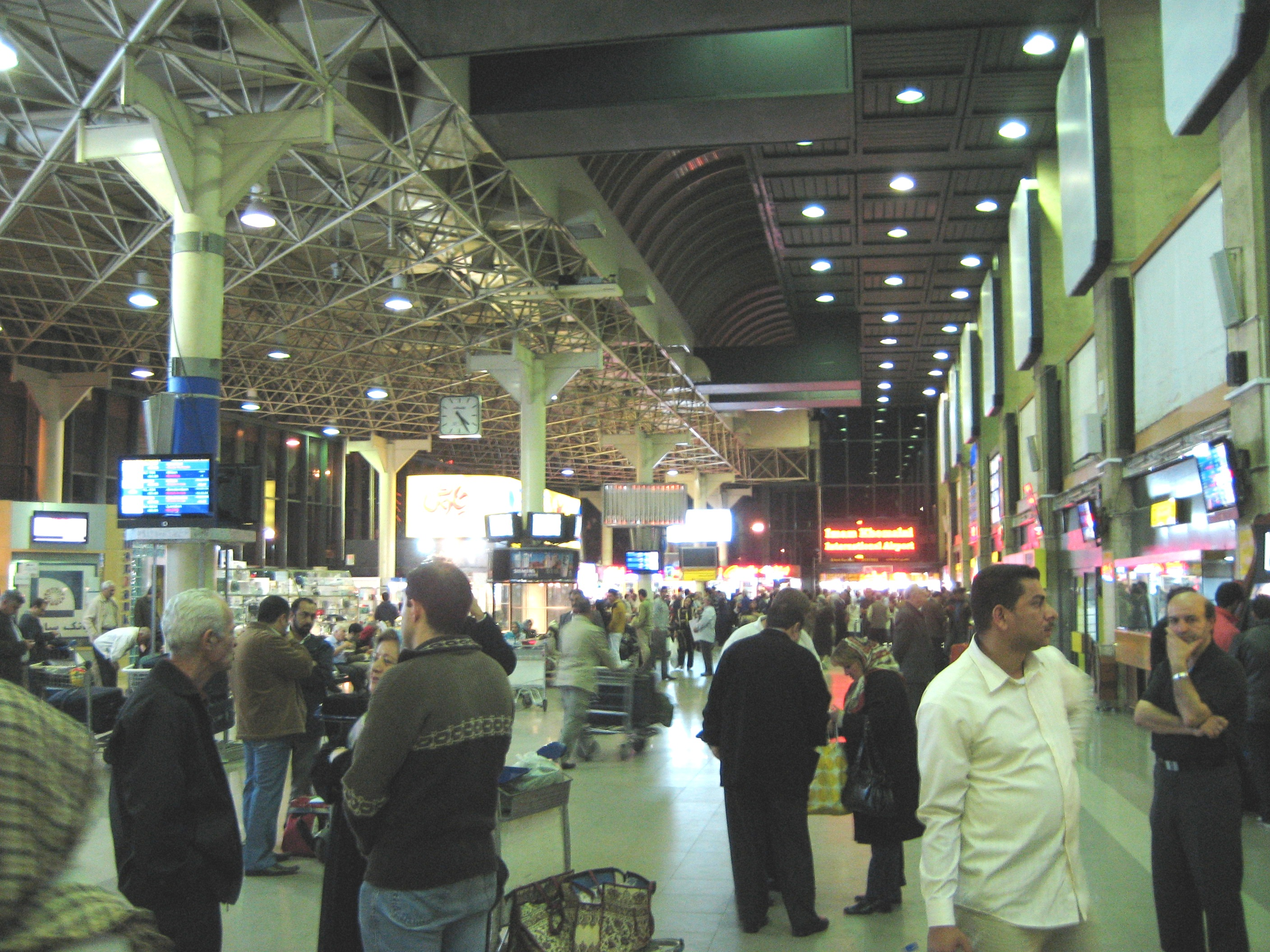 Mehrabad Airport, Tehran, Iran